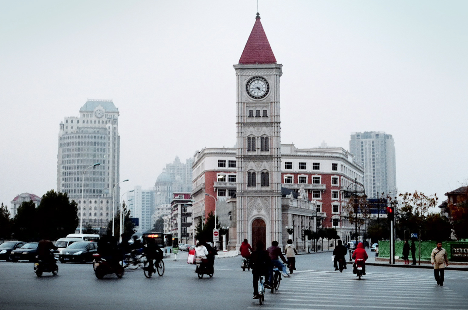 非常有歐洲味的天津呢!